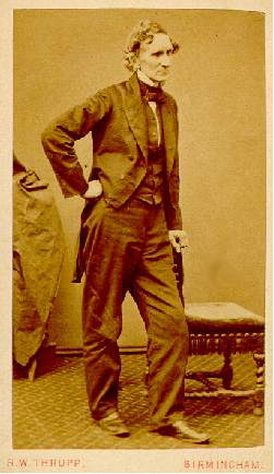 Elihu Burritt